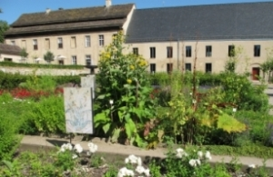 Die Klostergärten des ehemaligen Klosters Dalheim wurden auf einer Fläche von 2 Hektar wiederhergestellt und geben in der Stiftung Kloster Dalheim. LWL-Landesmuseum für Klosterkultur Eindruck von der klösterlichen Gartenbaukunst.